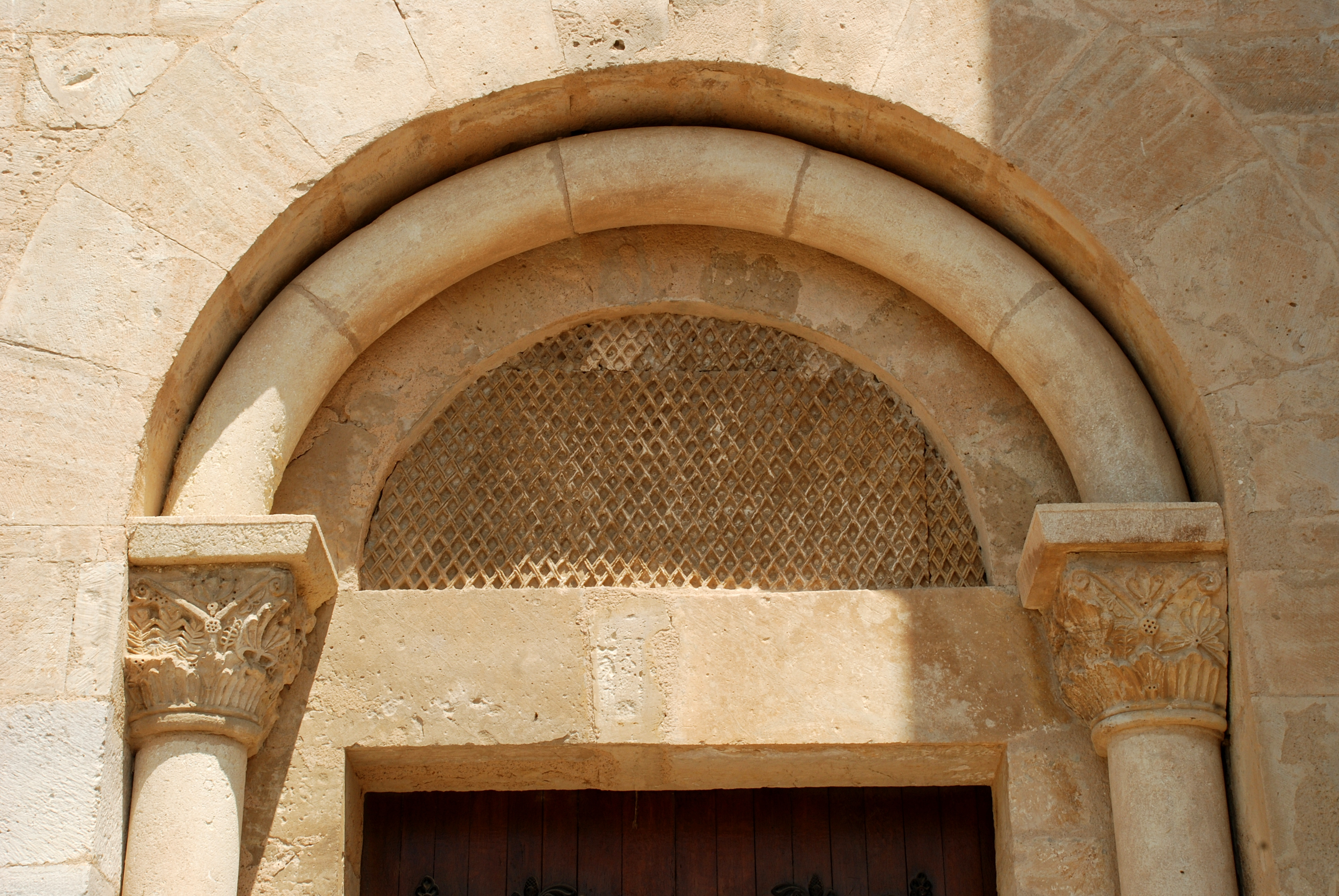 France - Languedoc - Hérault - Église Saint-Martial d'Assas